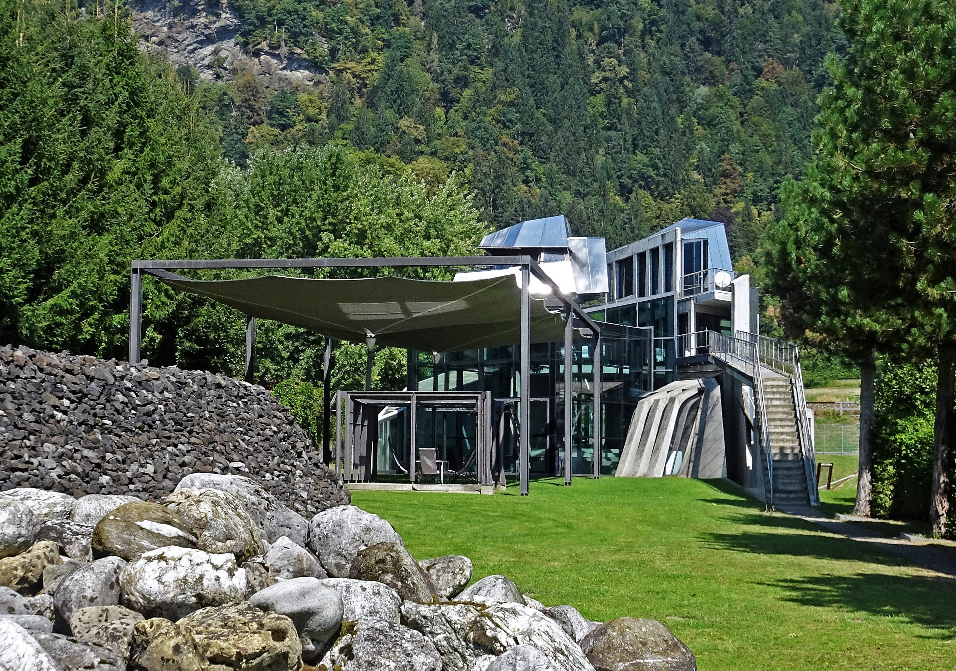 Das Steinhaus (Steindorf am Ossiachersee), Architekt Günther Domenig, Ansicht Südseite - vom See